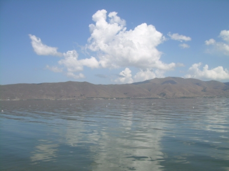 вид на озеро Севан и хребет Арегуни с полуострова Севан